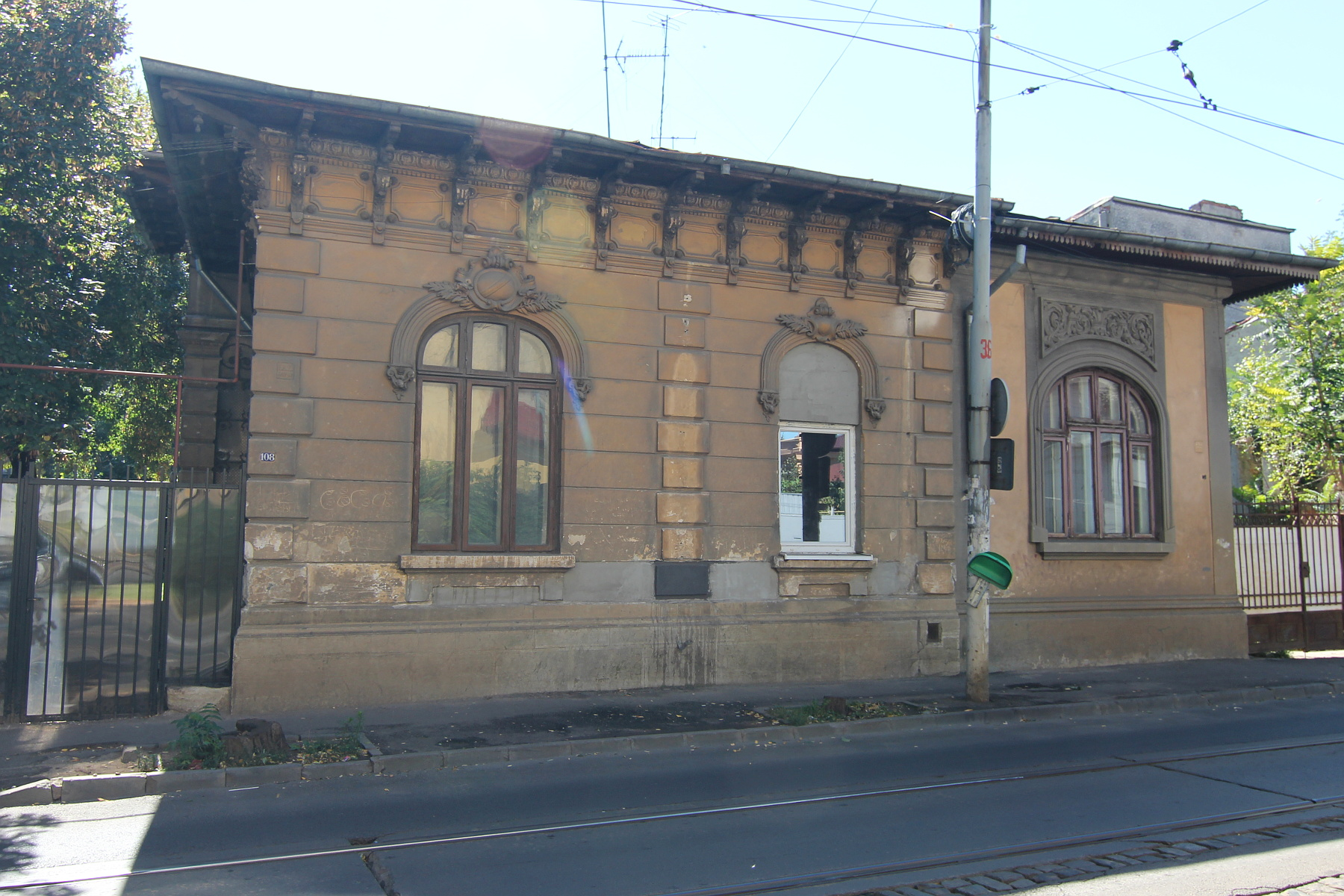 Casă pe Calea Călărașilor